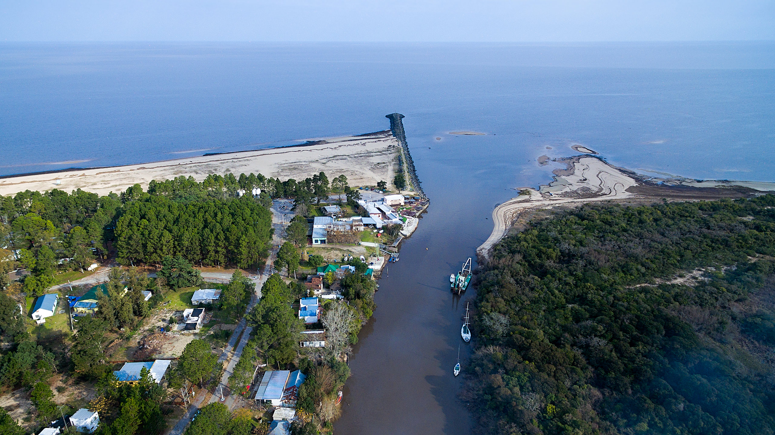 Desembocadura - Boca del Cufré